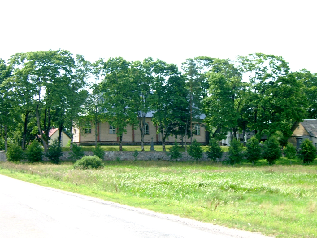 Upynos bažnyčia